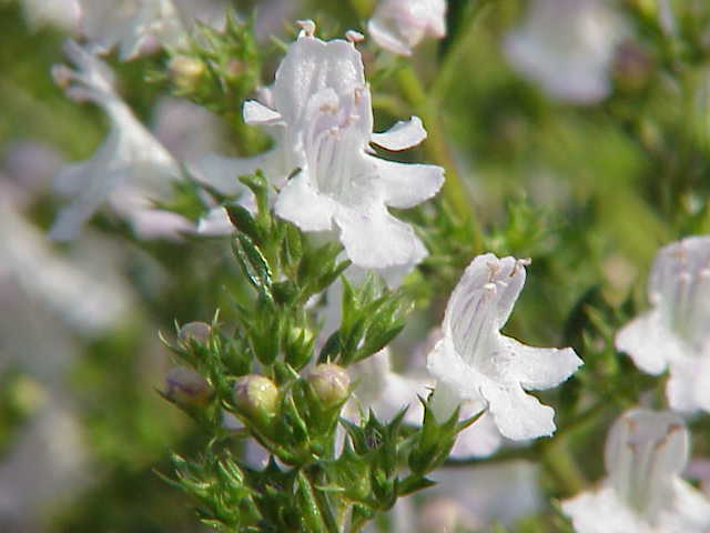 Species: Satureja montana Family: Lamiaceae Image No. 2